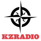 הלוגו של תחנת "הקצה